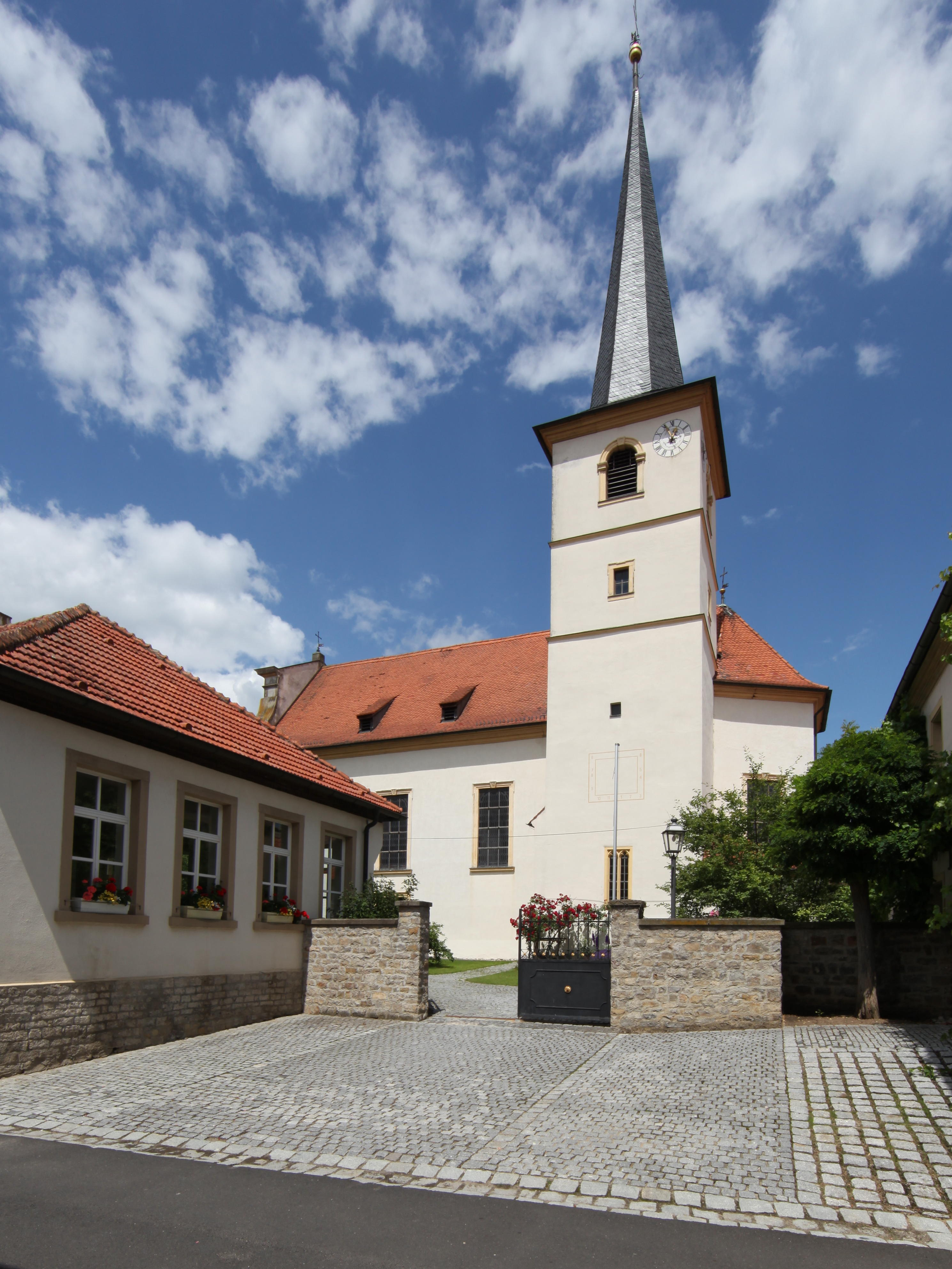 Katholische Kirche St. Stephanus in Kolitzheim, Bayern